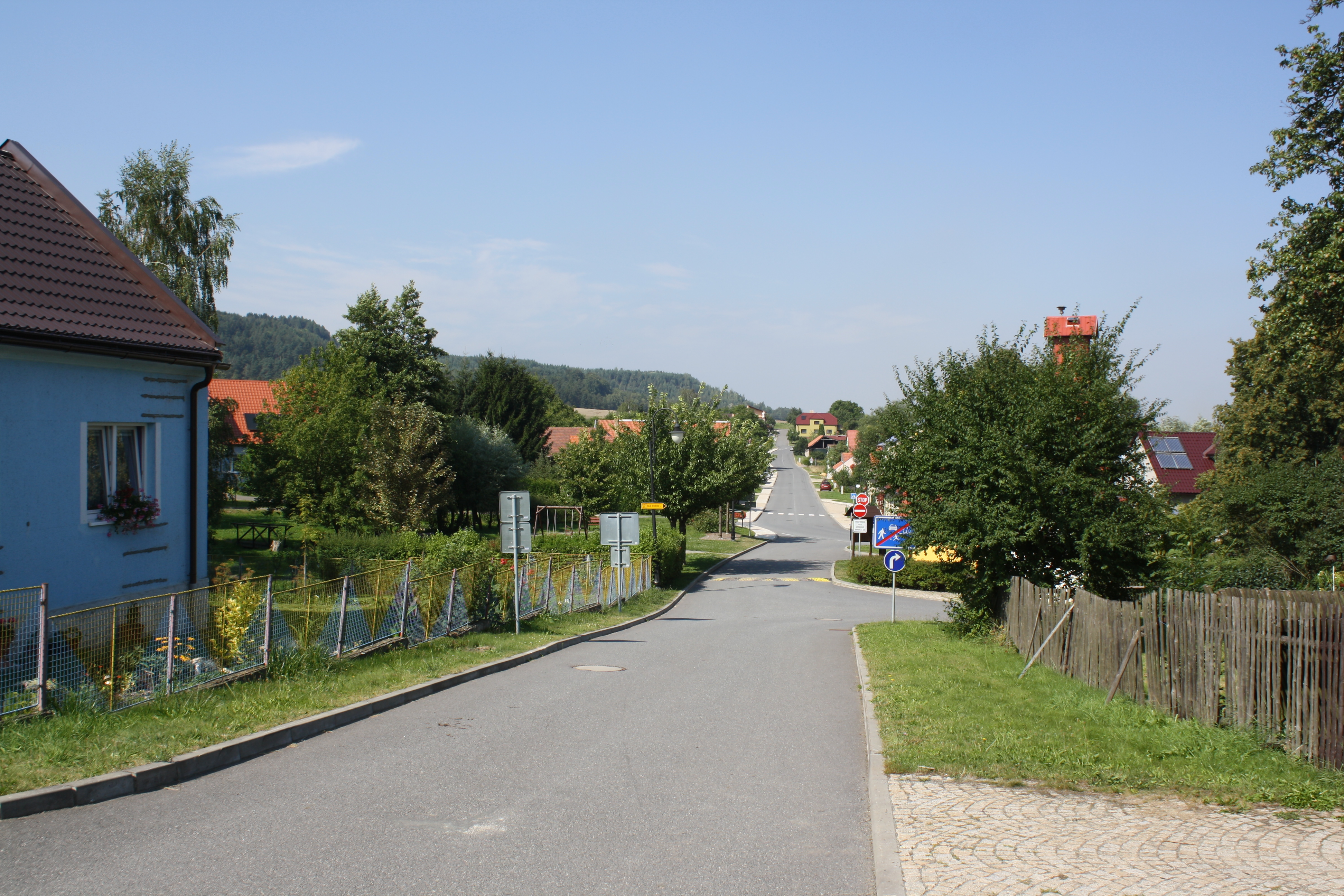 Pohled na Slatinou směrem k severu